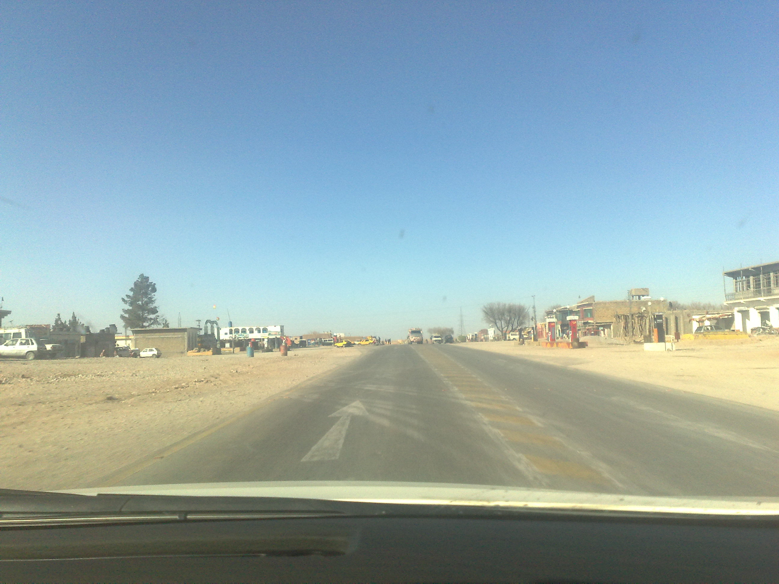 Surab